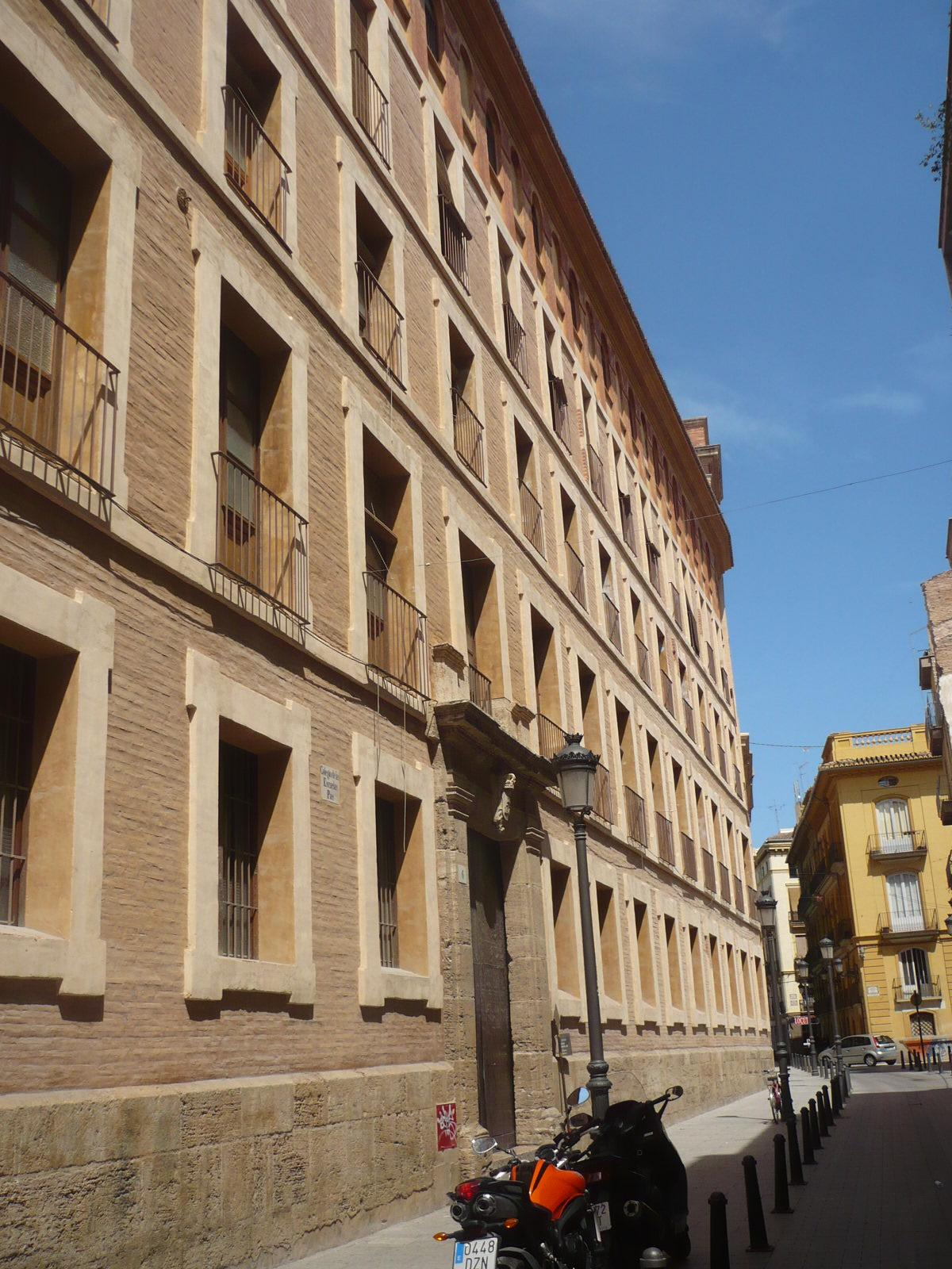 Puerta del Real Colegio de las Escuelas Pías de Valencia de la calle Carniceros.